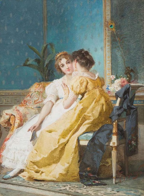 "La conversazione", olio su tela, 56 x 43 cm., firmato, coll. privata